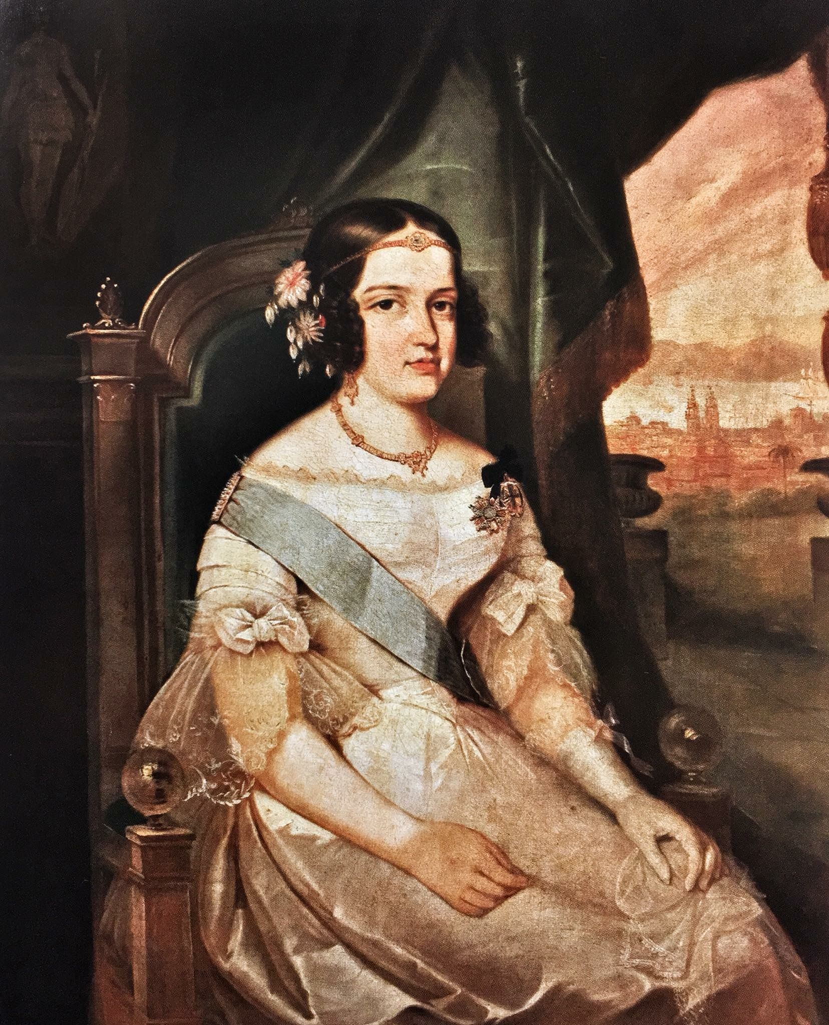 Retrato da Princesa Januária do Brasil por Armand Pallière.